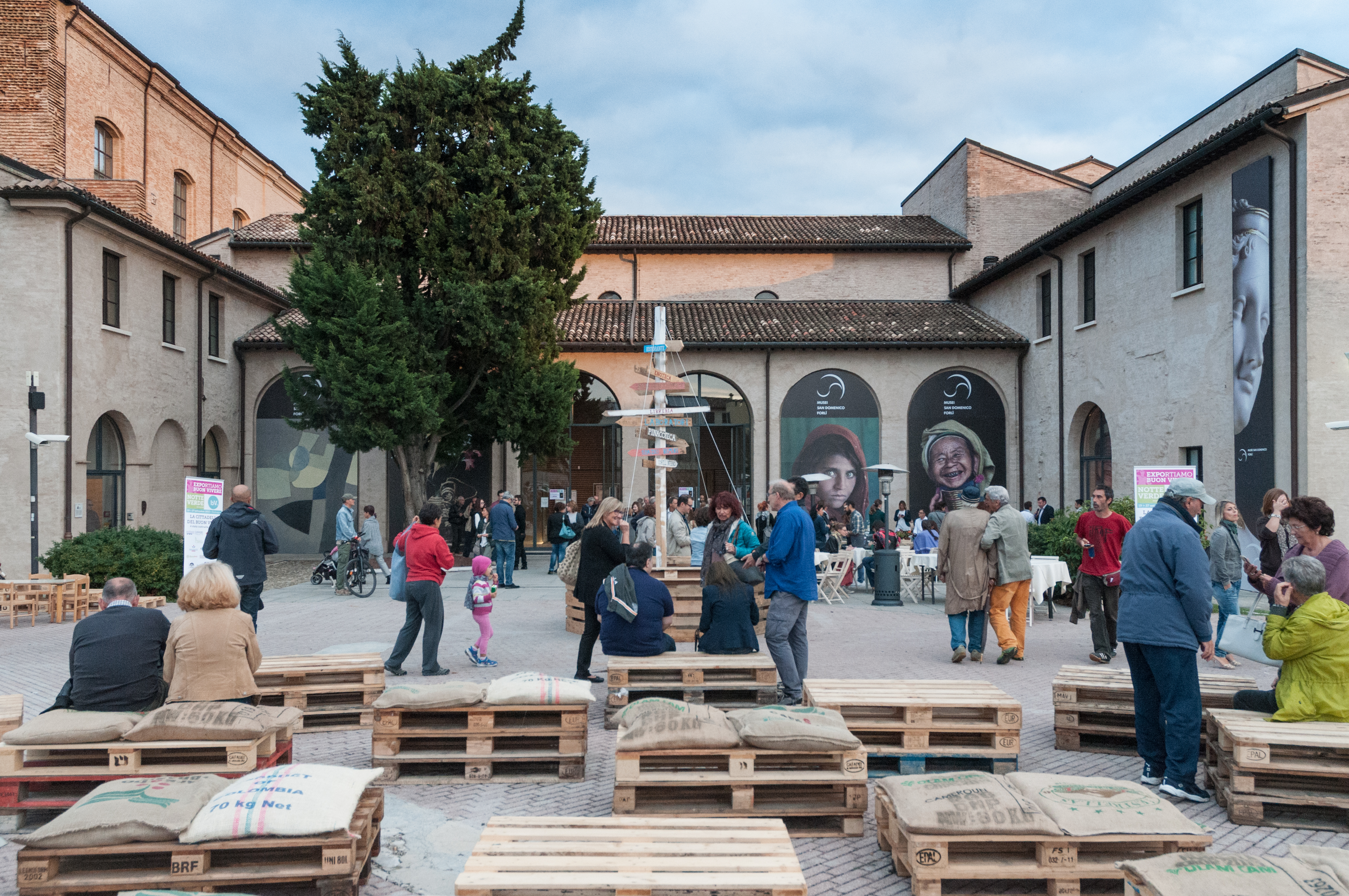 Musei San Domenico , inaugurazione della mostra dedicata a Steve McCurry This is a photo of a monument which is part of cultural heritage of Italy.